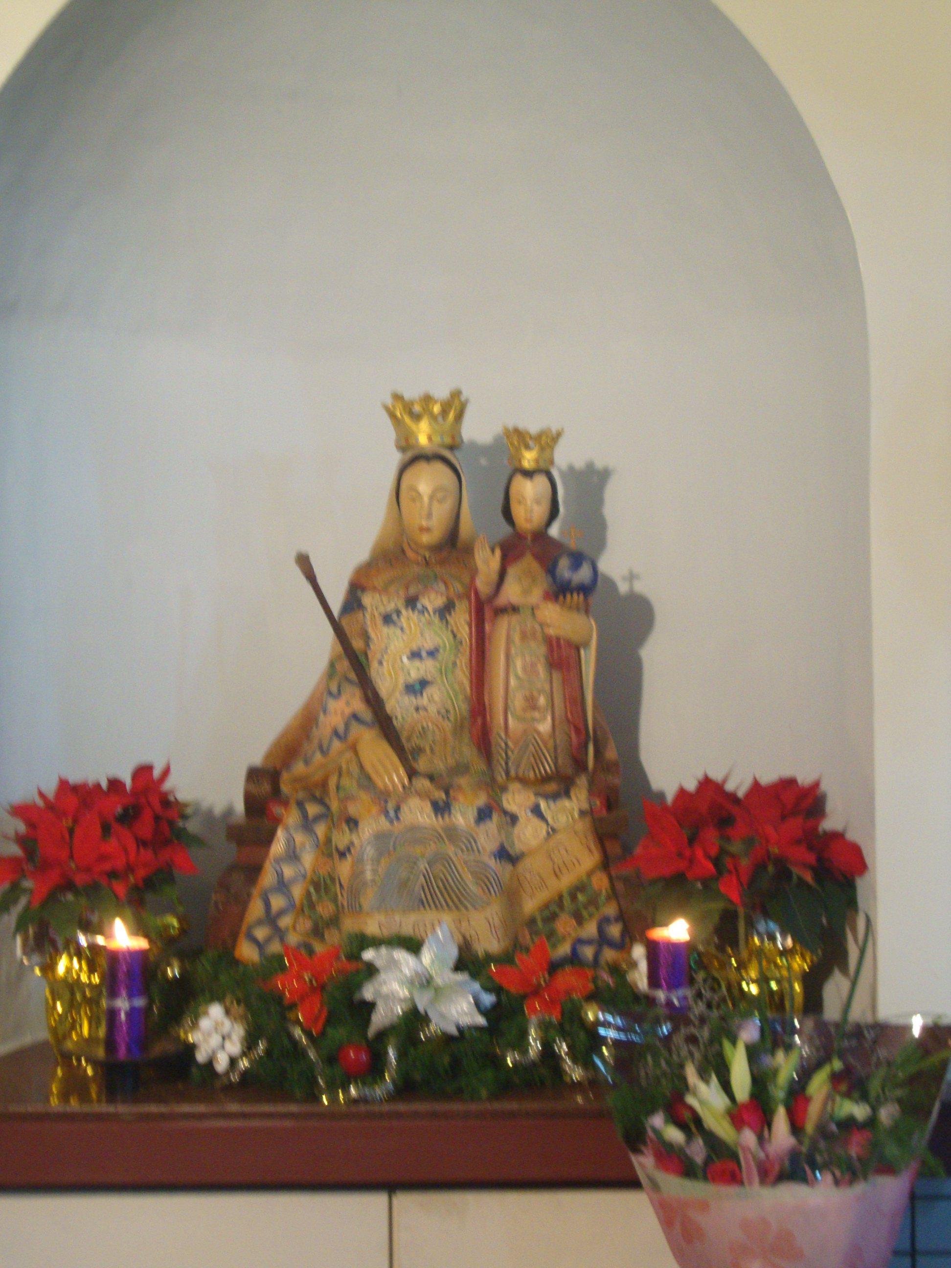 中文（台灣）: 於主曆2011年攝於梅山天主教中華聖母堂